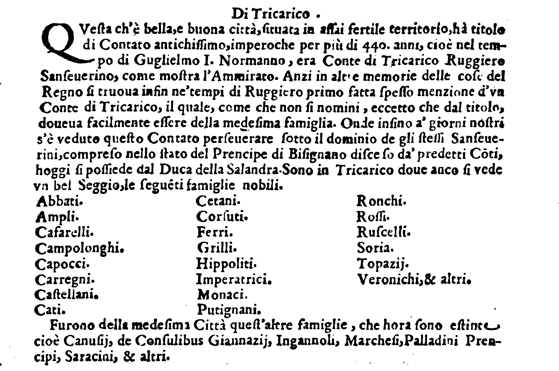 Descrizione della città di Tricarico proveniente dalla "Raccolta di notitie historiche" del 1675.